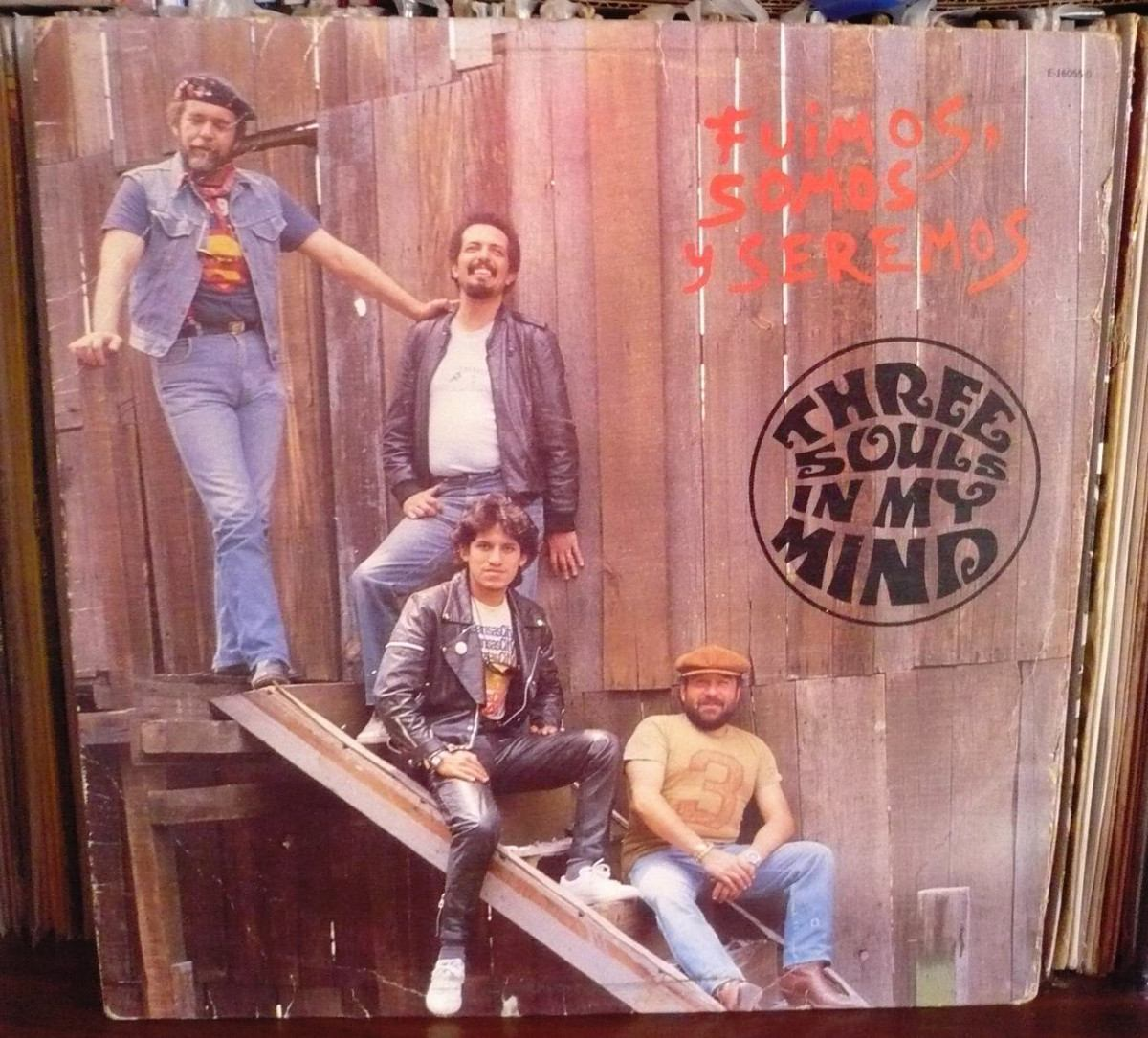 Portada del disco de Three souls in my mind. Lp fuimos somos y seremos grabado en 186 para discos Peerless internacional